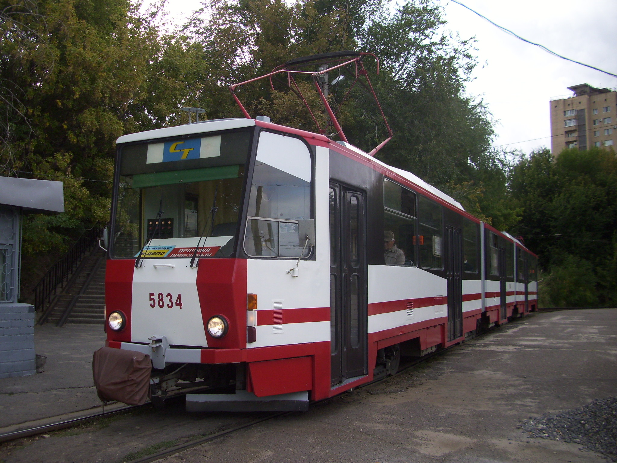 Трамвай Tatra KT8D5-5834 в Волгограде